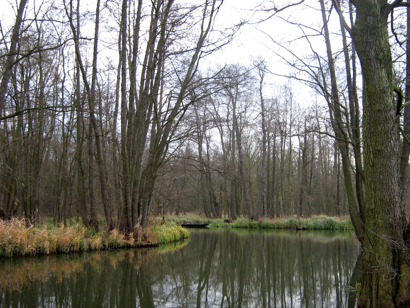 Die „Groß Wasserburger Spree“ in Groß Wasserburg im Unterspreewald